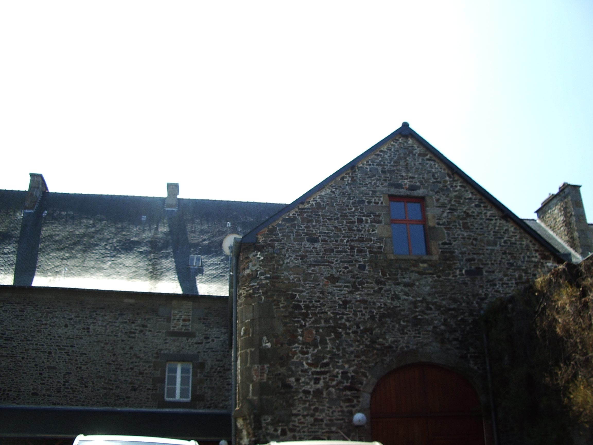 Ancien Carmel de Dol-de-Bretagne/ rue des Carmes .